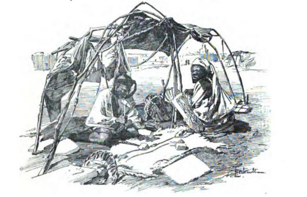 Man seen retailing salt just outside Timbuktu